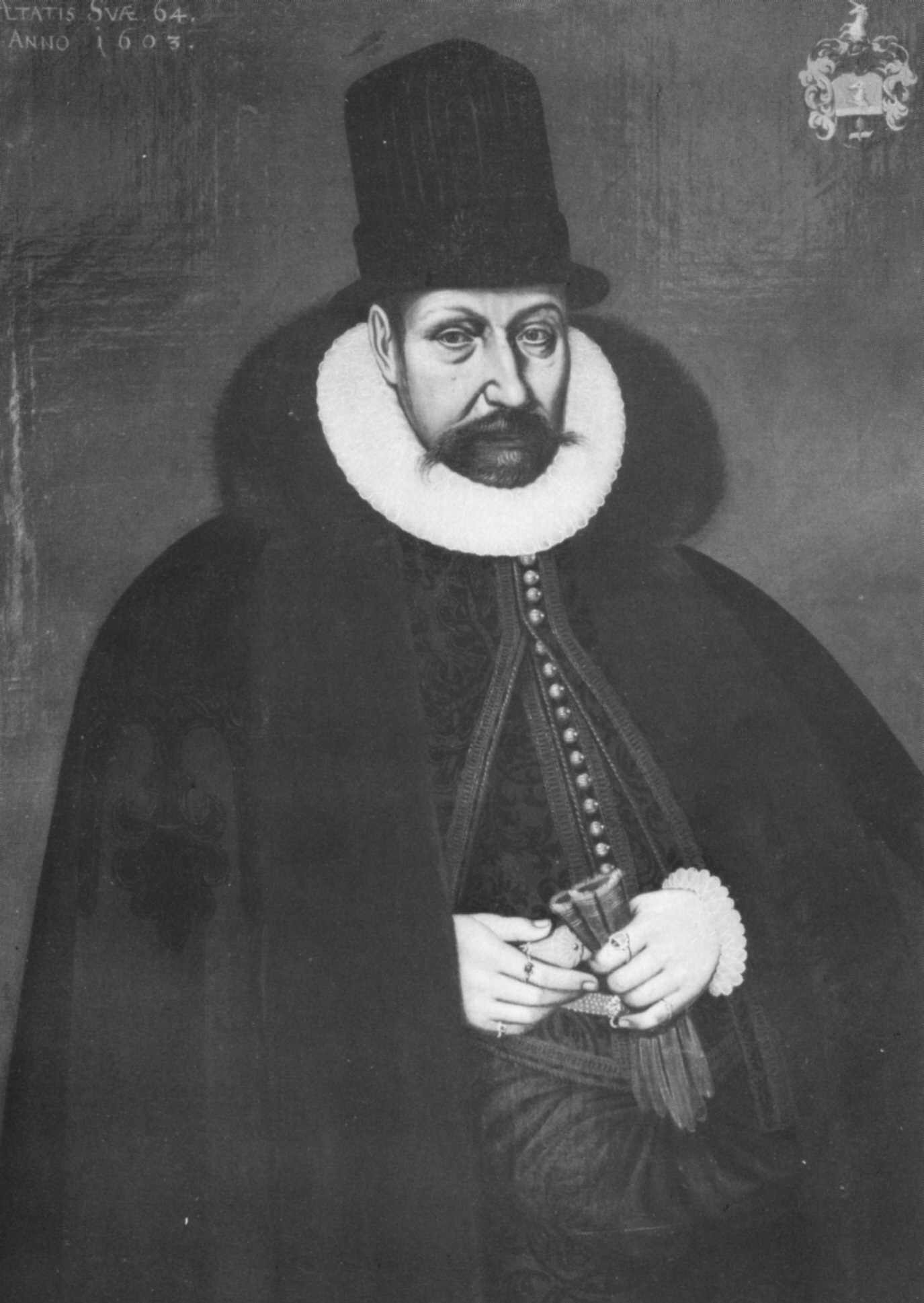 Conrad Garmers (* 1539; † 1612), Lübecker Bürgermeister